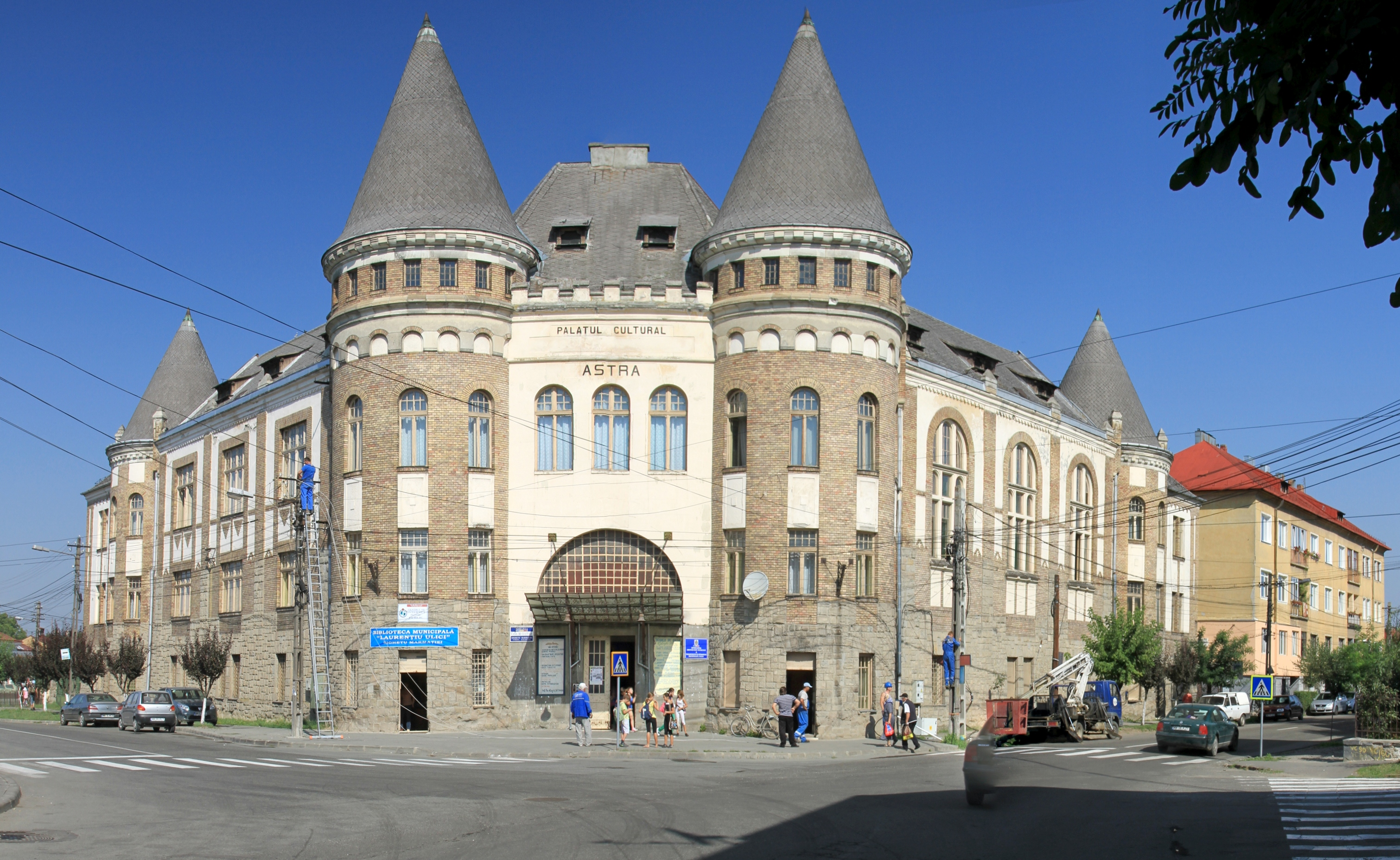 Centrul istoric al orașului Sighetu Marmației - Palatul Culturii ASTRA